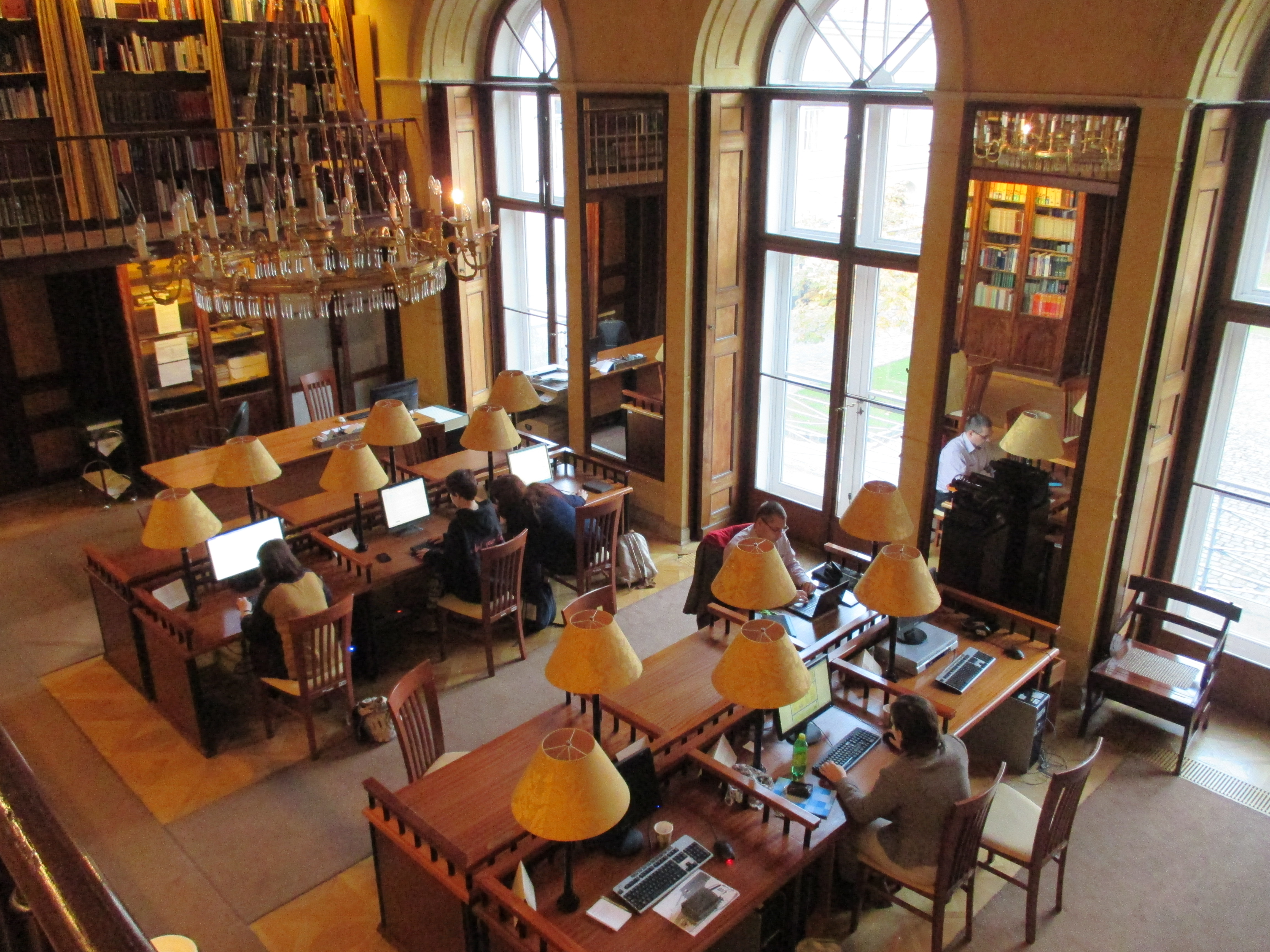 A Shakespeare-szerkesztőmaraton résztvevői (Budapest, Károlyi-palota (Petőfi Irodalmi Múzeum))